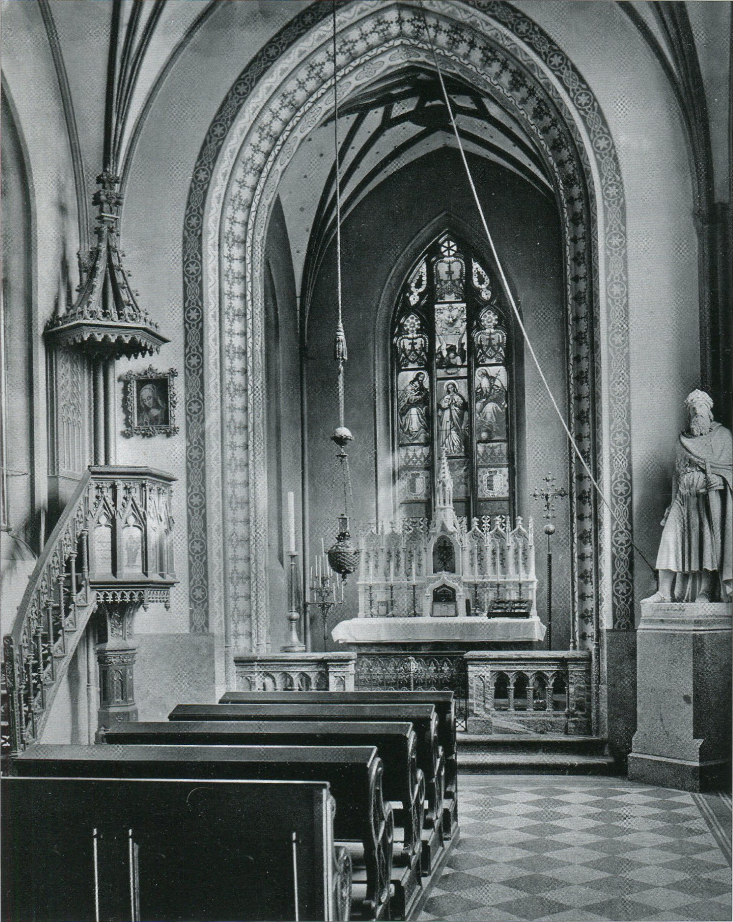 Interiér zámecké kaple na Sychrově z 90. let 19. století, fotografie Jindřicha Eckerta. Nad oltářem velká vitráž Korunovace Panny Marie od J. Z. Quasta, pod ní oltář z karárského mramoru o J. Víška. Napravo je socha Godefroye de Bouillon od Emanuela Maxe.